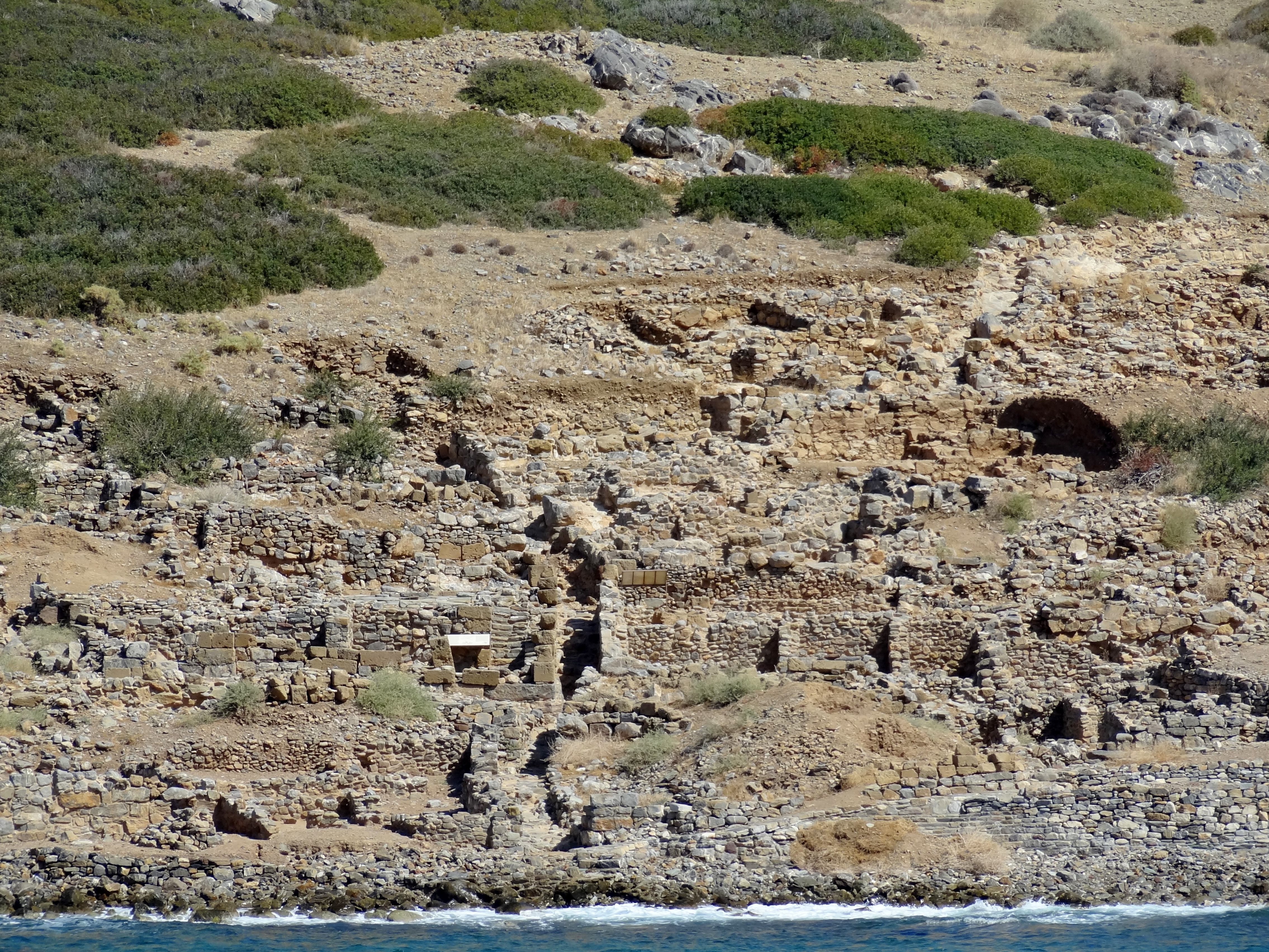 Ausgrabungsstätte auf der Insel Agios Nikolaos (Άγιος Νικόλαος) vor Mochlos (Μόχλος), Kreta, Griechenland